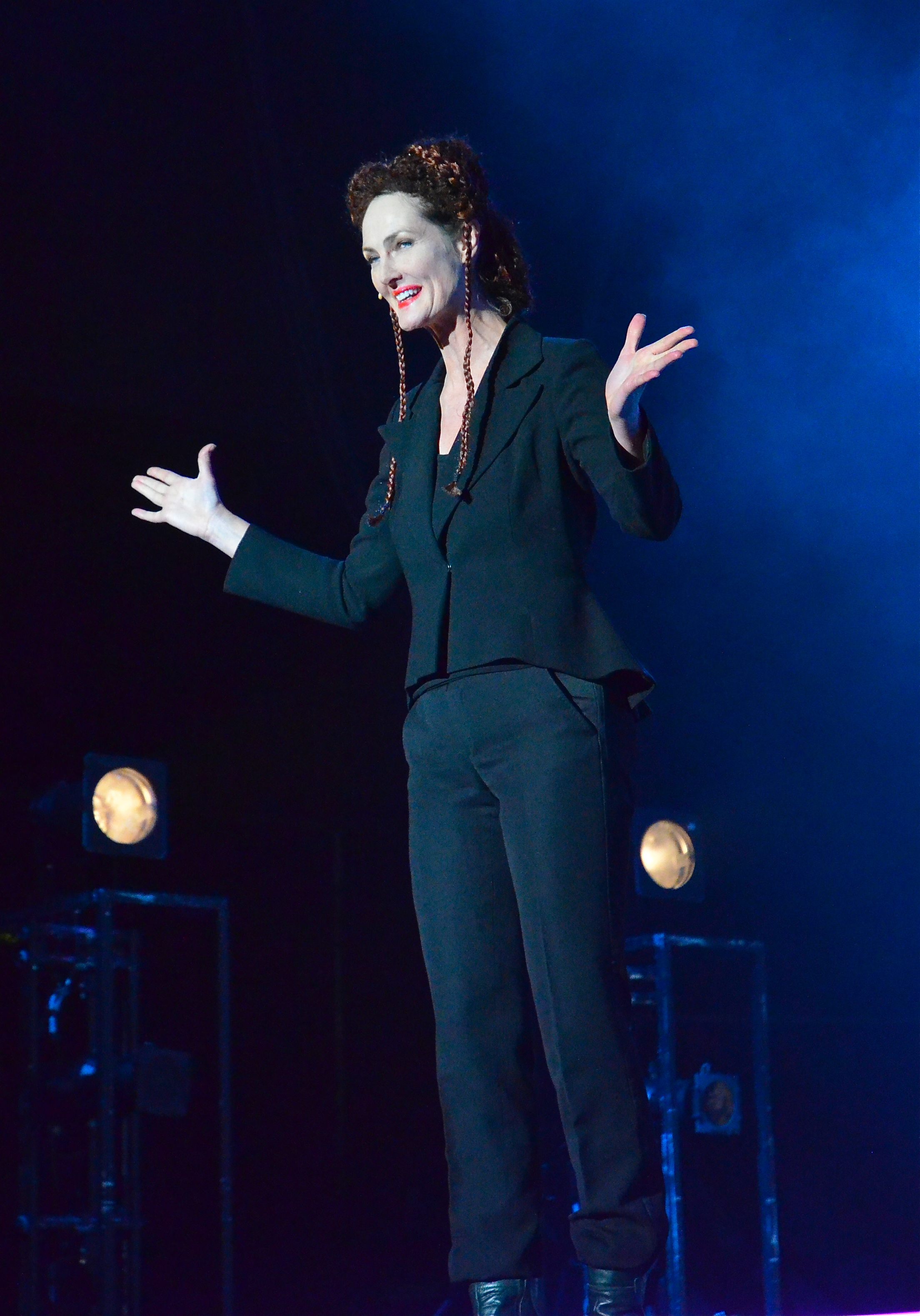 Charlotte Engelkes på Kulturfestivalen på Gustav Adolfs torg i Stockholm 17 aug 2011.